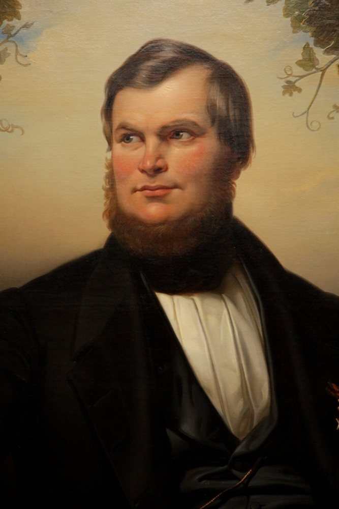 Portret van Johannes Theunis Roessingh Udink (1805-1858), heer van Singraven, Harseveld en Gravenhuis, burgemeester van Denekamp, lid van Provinciale Staten en lid van Gedeputeerde Staten van Overijssel.